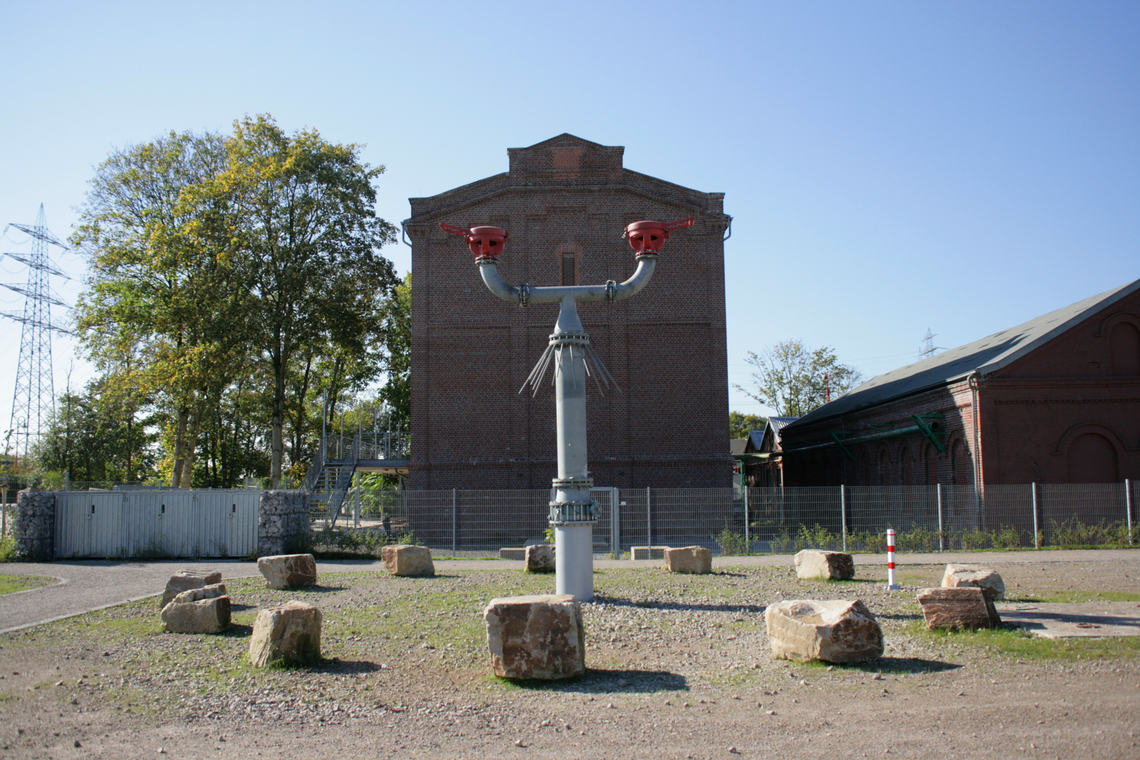 Künstlerzeche Unser Fritz 2/3, Dorstener Straße in Herne